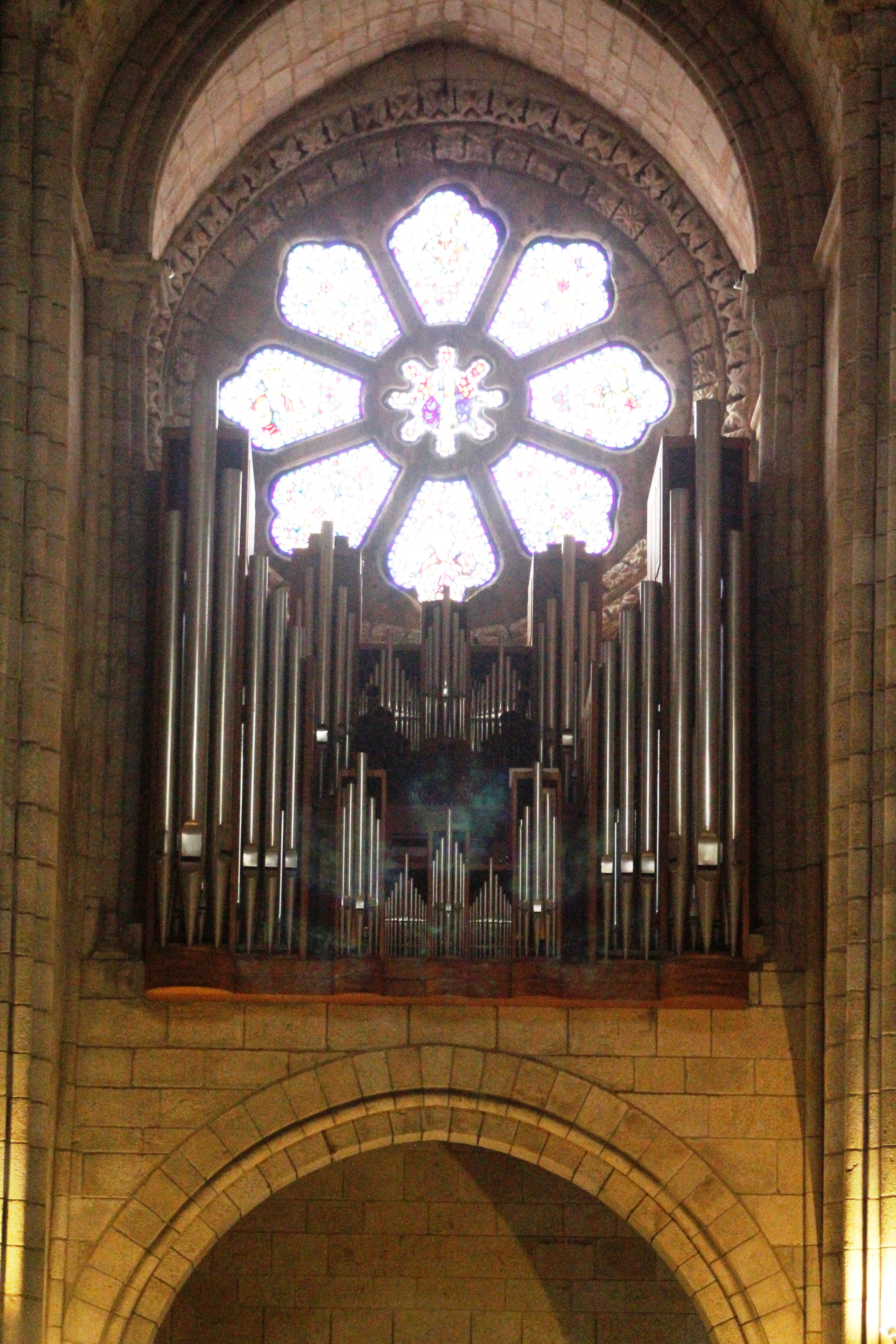 Orgão e Roseta